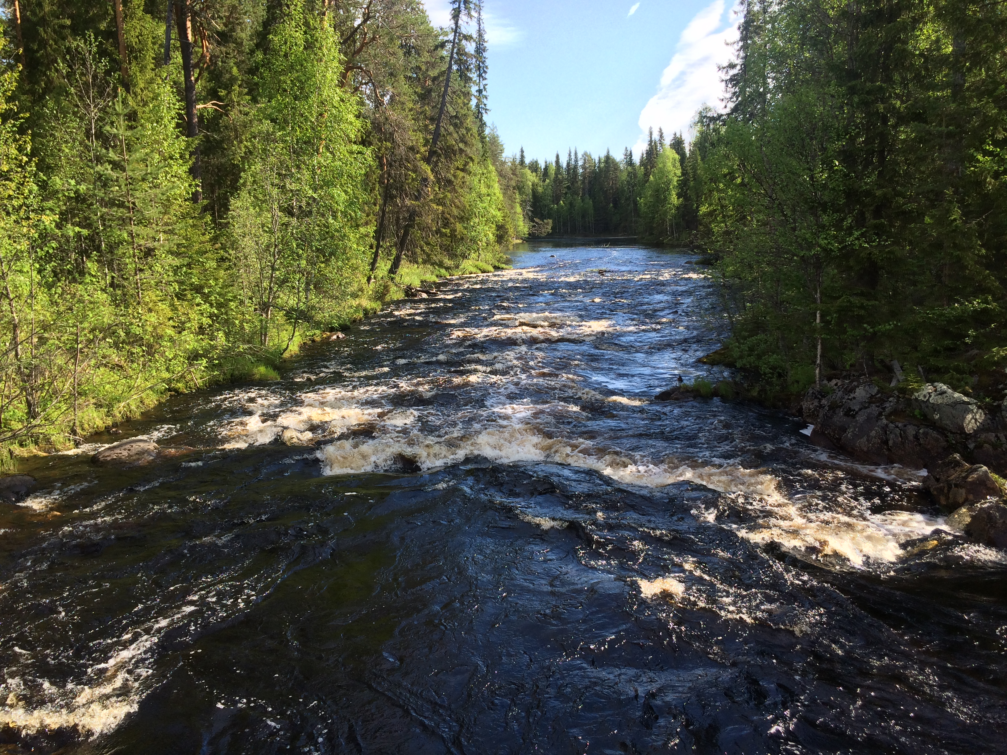 река Ливо